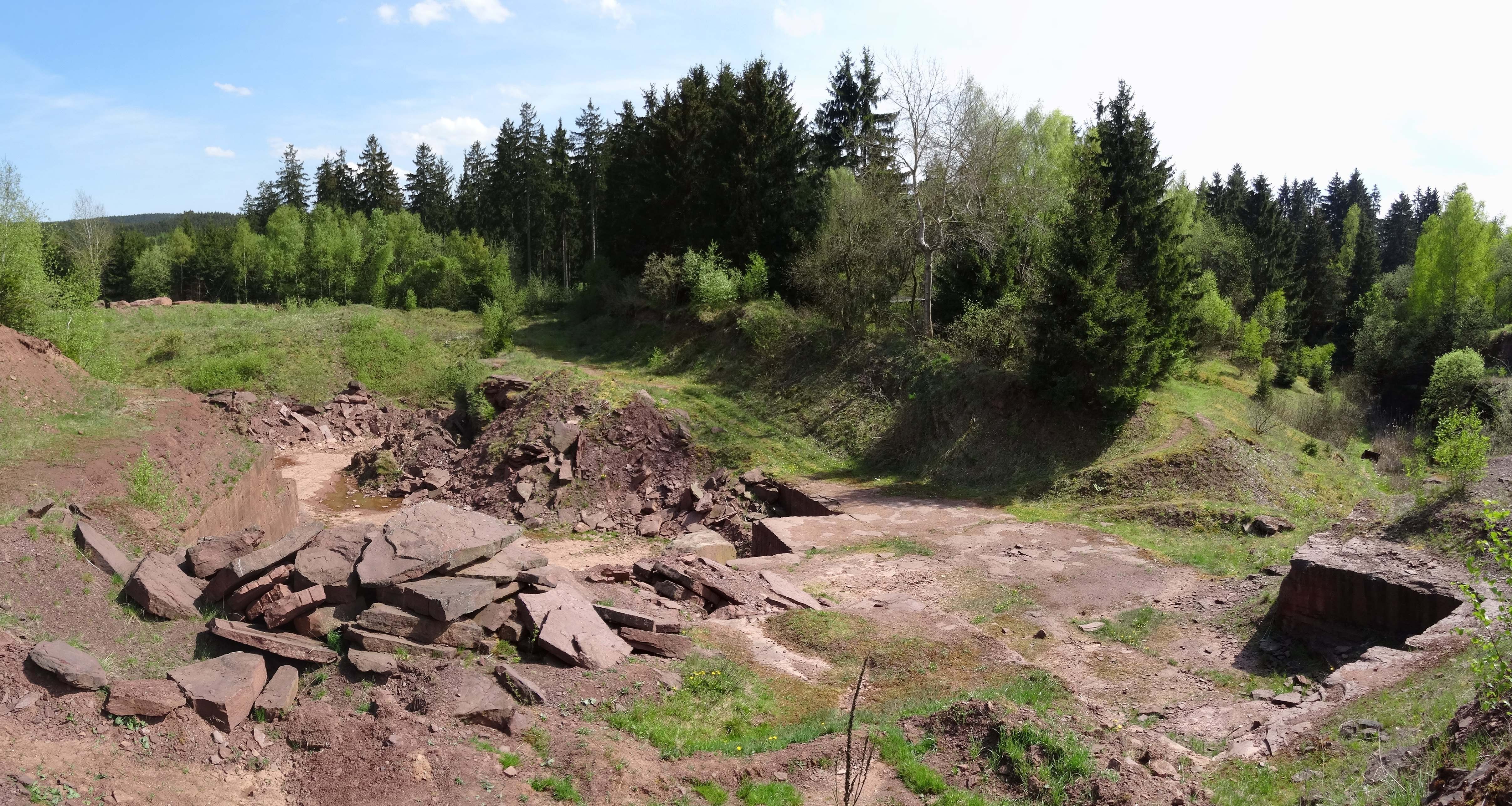 Blick nach Südosten über den „Ravine Quarry“, einen der Steinbrüche und Fossilfundstellen am Bromacker bei Tambach-Dietharz